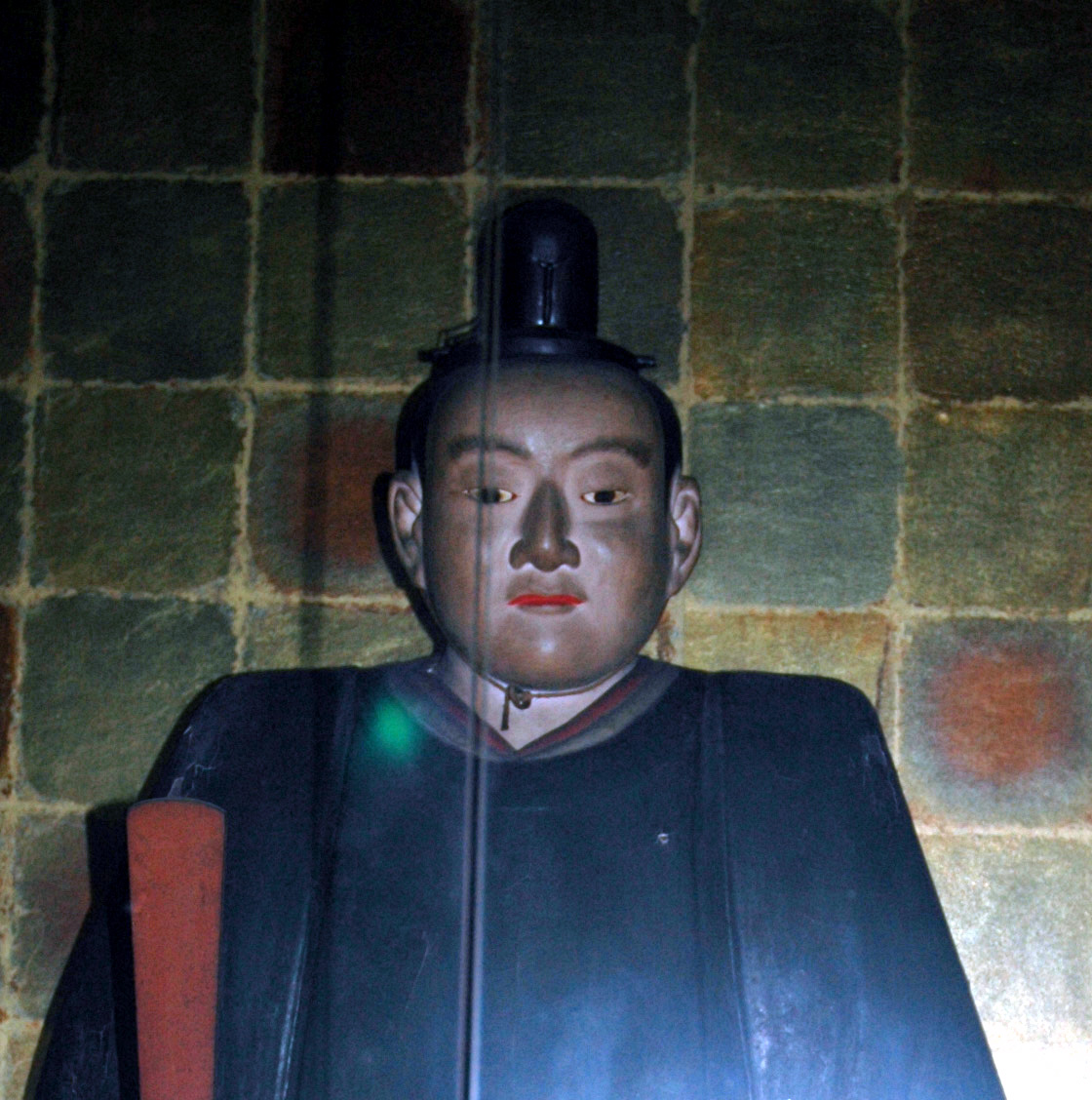 statue of Nakamura Kazutada in Kannoji Yonago, Tottori, Japan